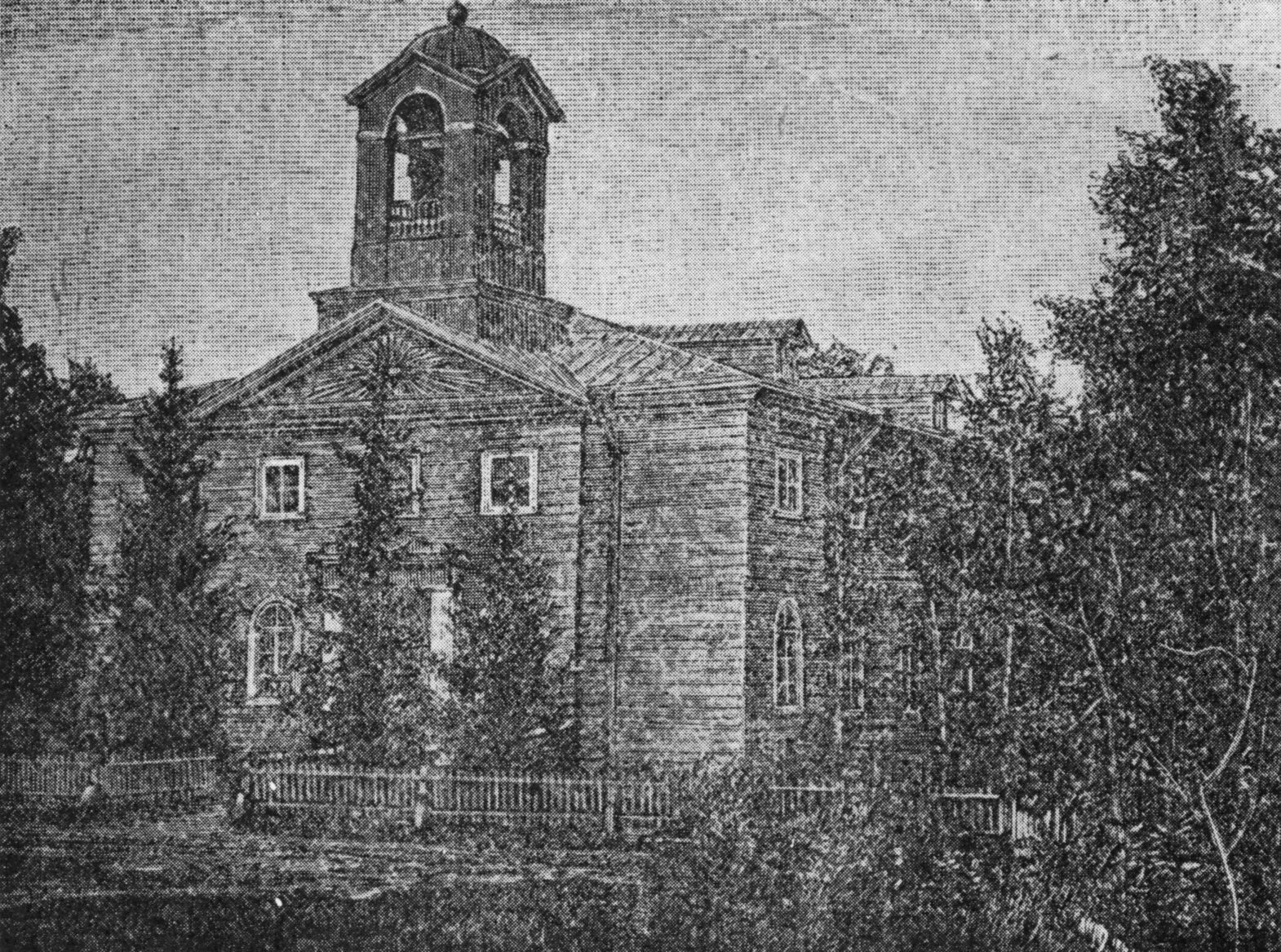 Кирха в Войскорово. Фотогравюра.